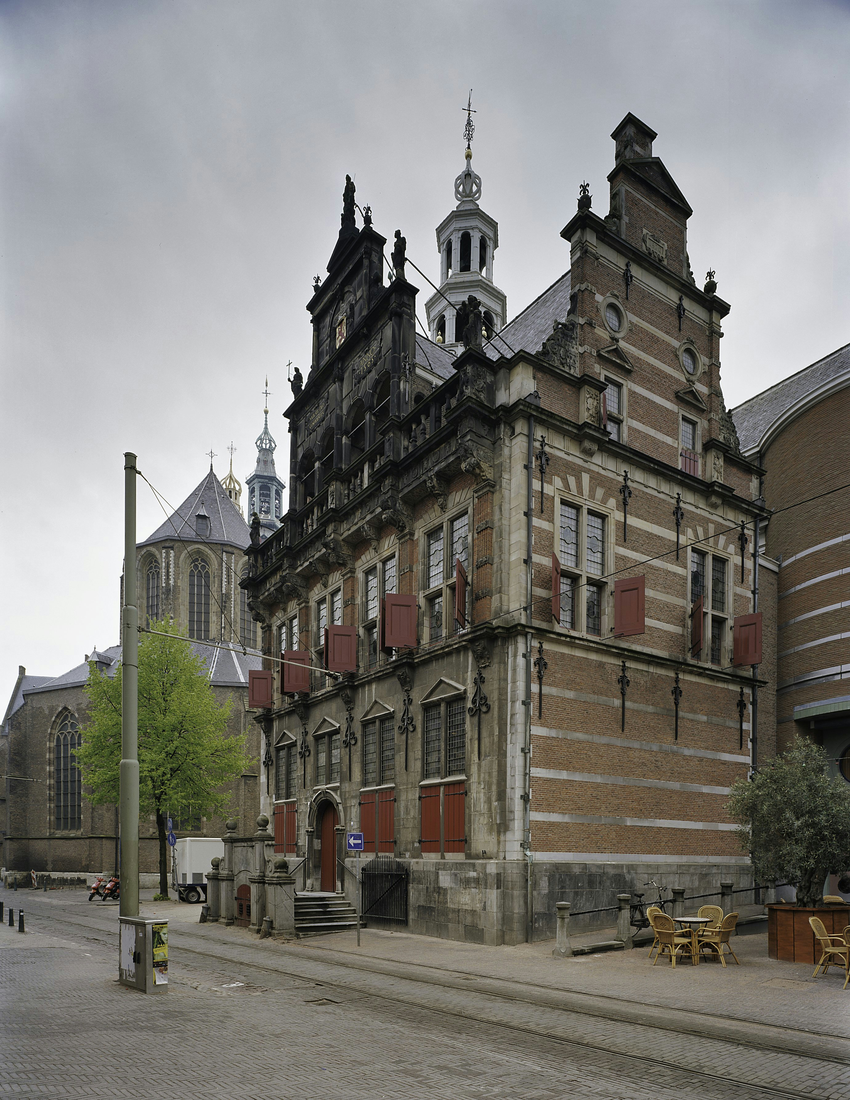 Oude stadhuis: Gevels voorzien van beeldhouwwerk en muurankers (opmerking: Gefotografeerd voor Monumenten In Nederland Zuid-Holland)